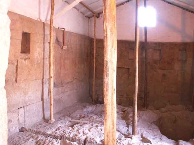 Vue de la chambre où était enfermé Atahualpa, et dans laquelle il a donné l'ordre de la remplir d'or et d'argent jusqu'au niveau qu'il indiqua avec sa main.